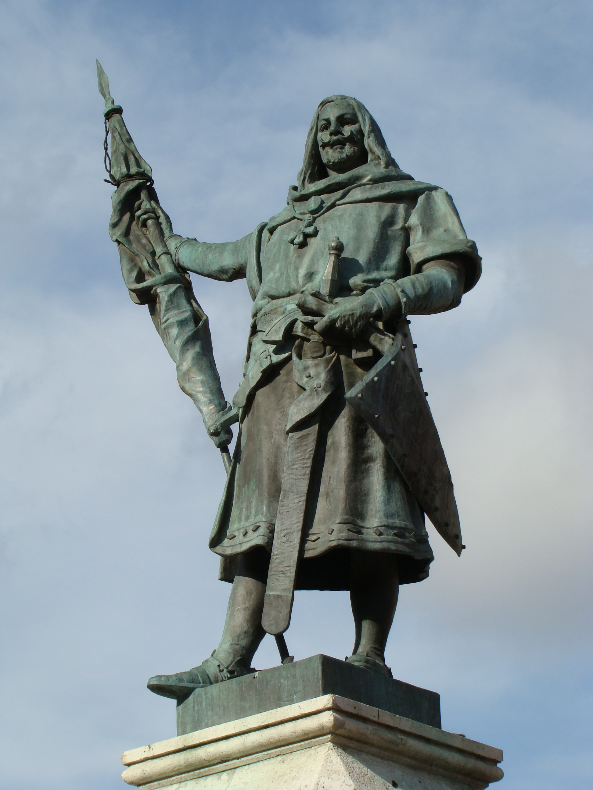 Estatua del conde Ansúrez, señor de Valladolid (siglos XI y XII) en la plaza Mayor de esta ciudad.